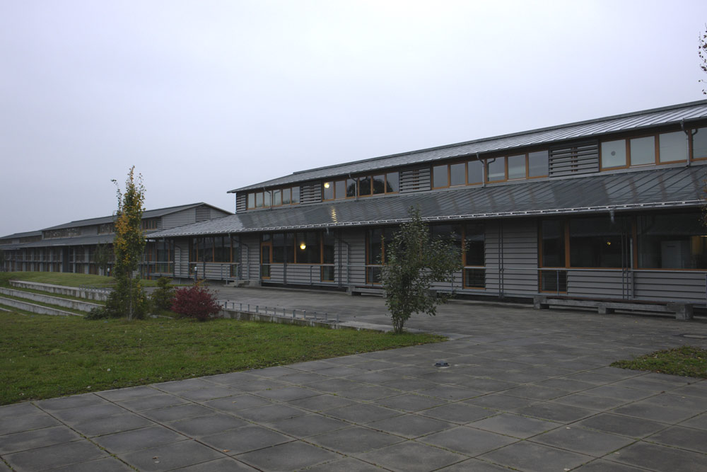 Ansicht des Wohnbereichs der Fachhochschule der Bundesagentur für Arbeit in Schwerin